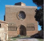 Hesiko Saturnino santua Artaxona